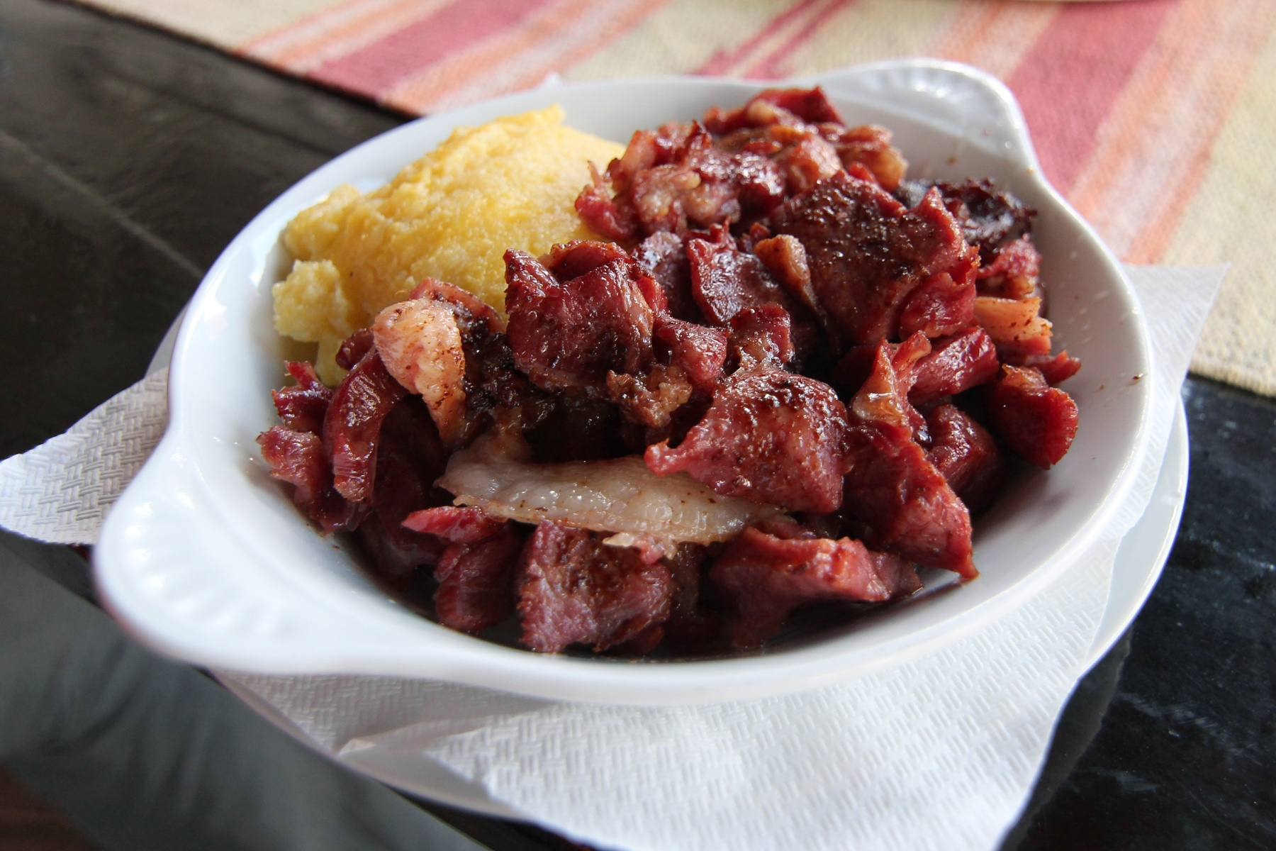 Pastramă de berbecuț prajită cu mămaligă